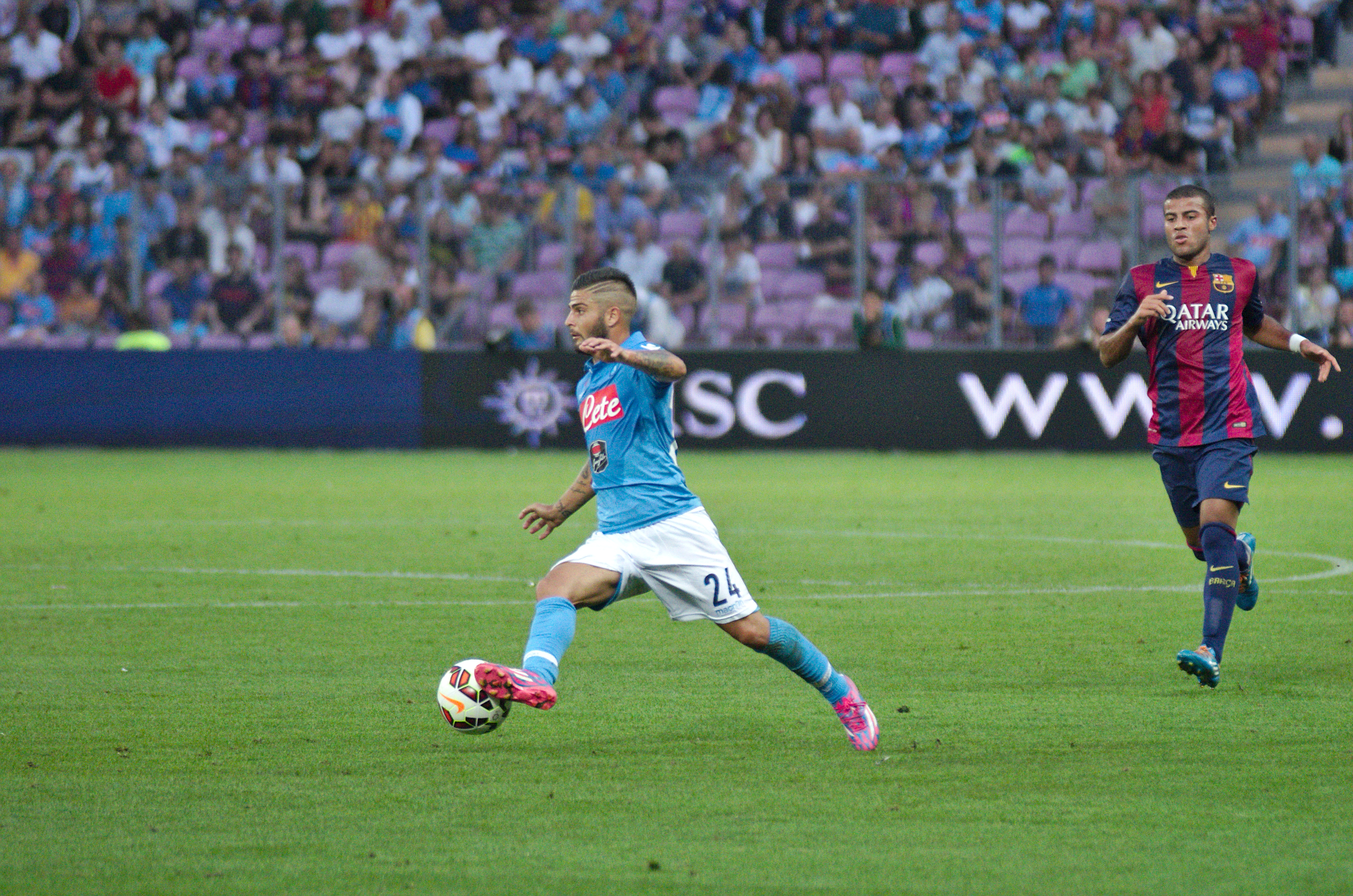 Barça - Napoli - 20140806